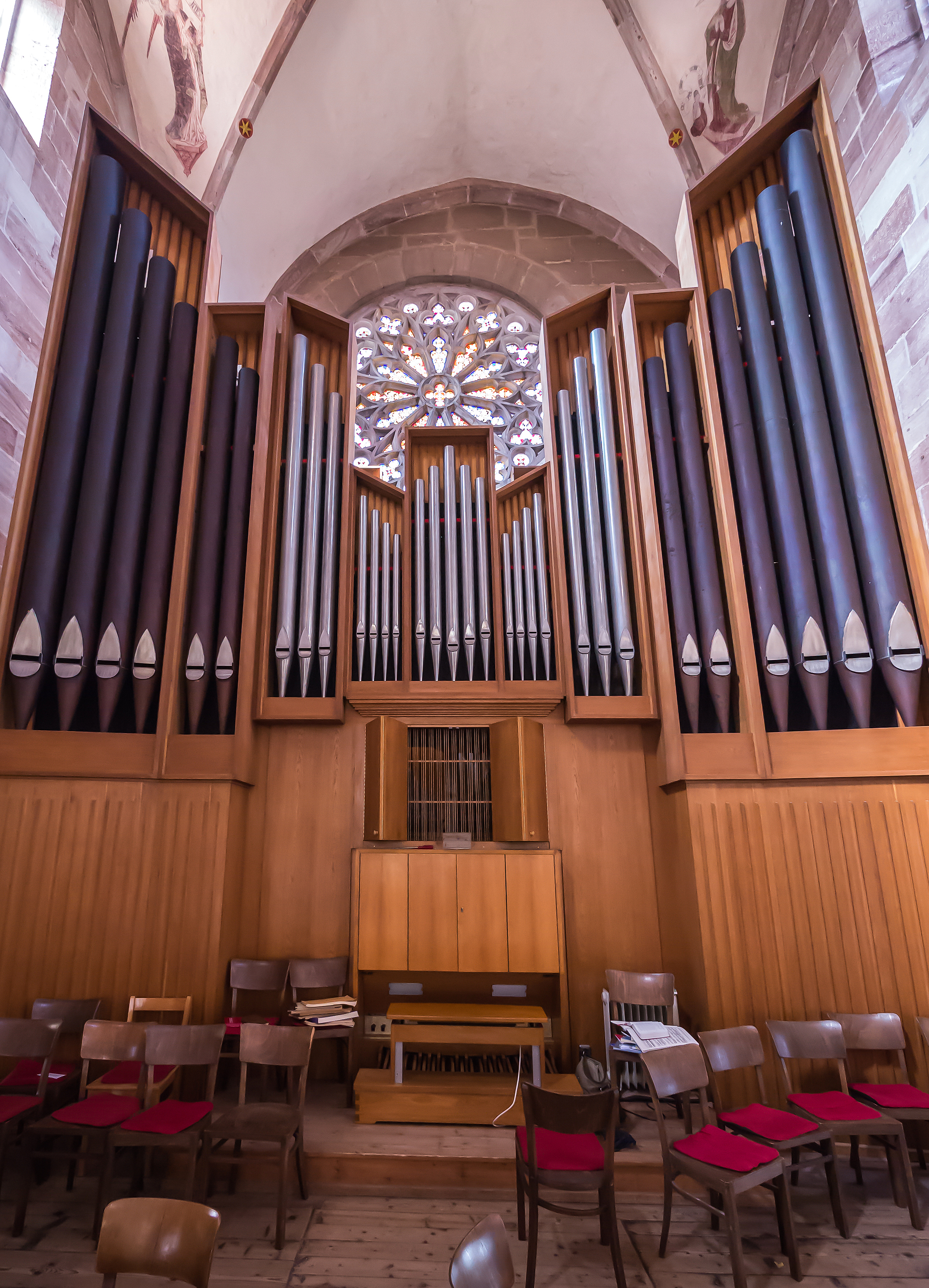 Heilbad Heiligenstadt Friedensplatz 1 St. Martin Pfarrkirche (evangelisch) Orgel 1